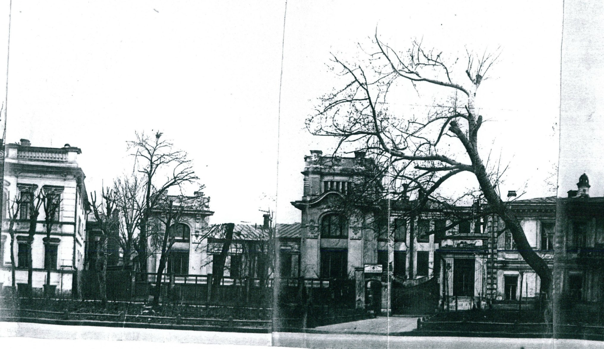 Архивное фото жилого дома С. Ф. Циммерман по адресу Москва, Проспект мира, д. 25, стр. 1. Здание было перестроено из ампирного особняка в модерн по проекту гражданского архитектора А. С. Гребенщикова в 1902 году.